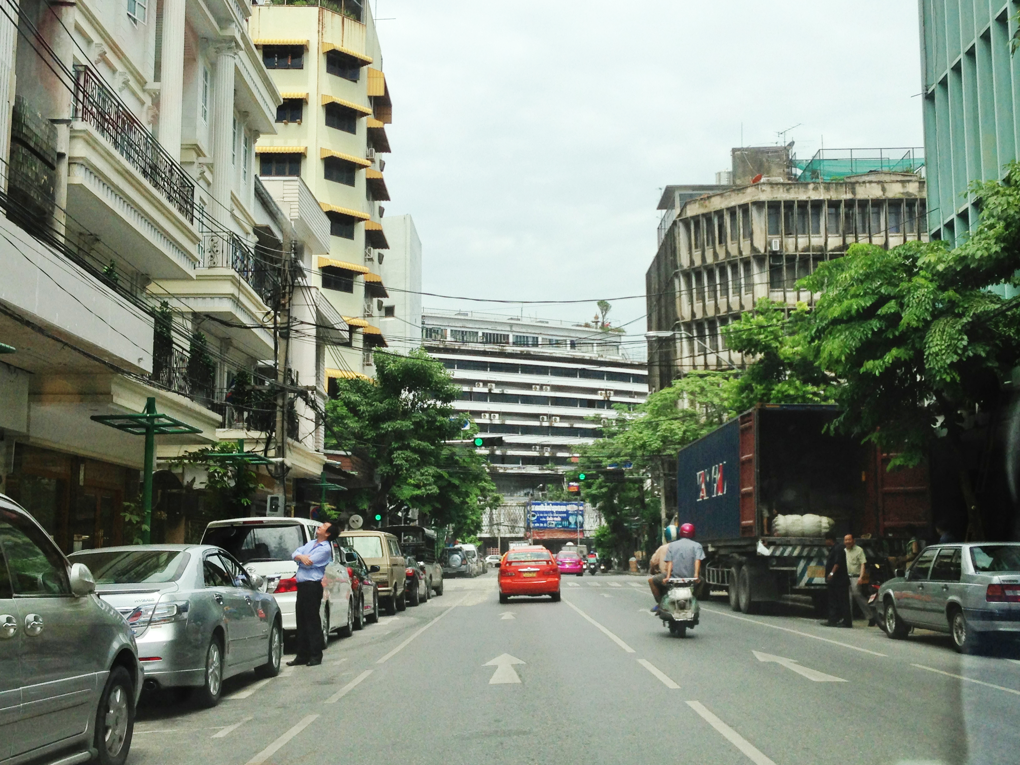 Lam Phun Chai road, talat Noi, Samphanthawong, Bangkok Thailand